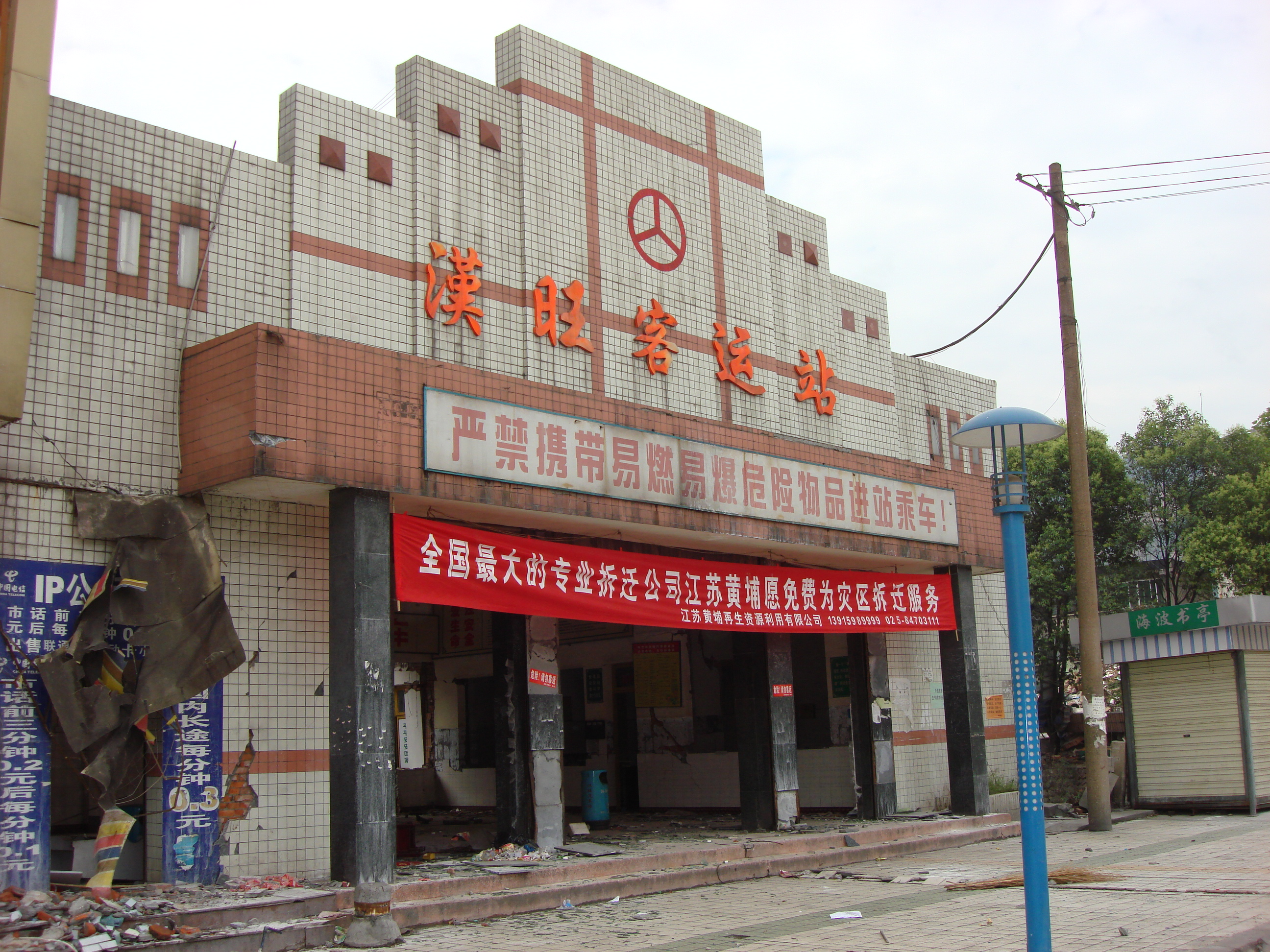 汉旺客运站